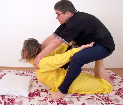 Pozice "kobra" používaná v pozdější fázi thajské masáže u ohebných pacientů.